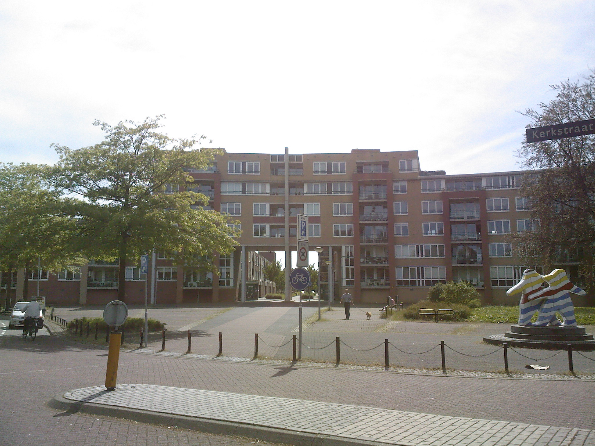 Appartementen Keent in Weert